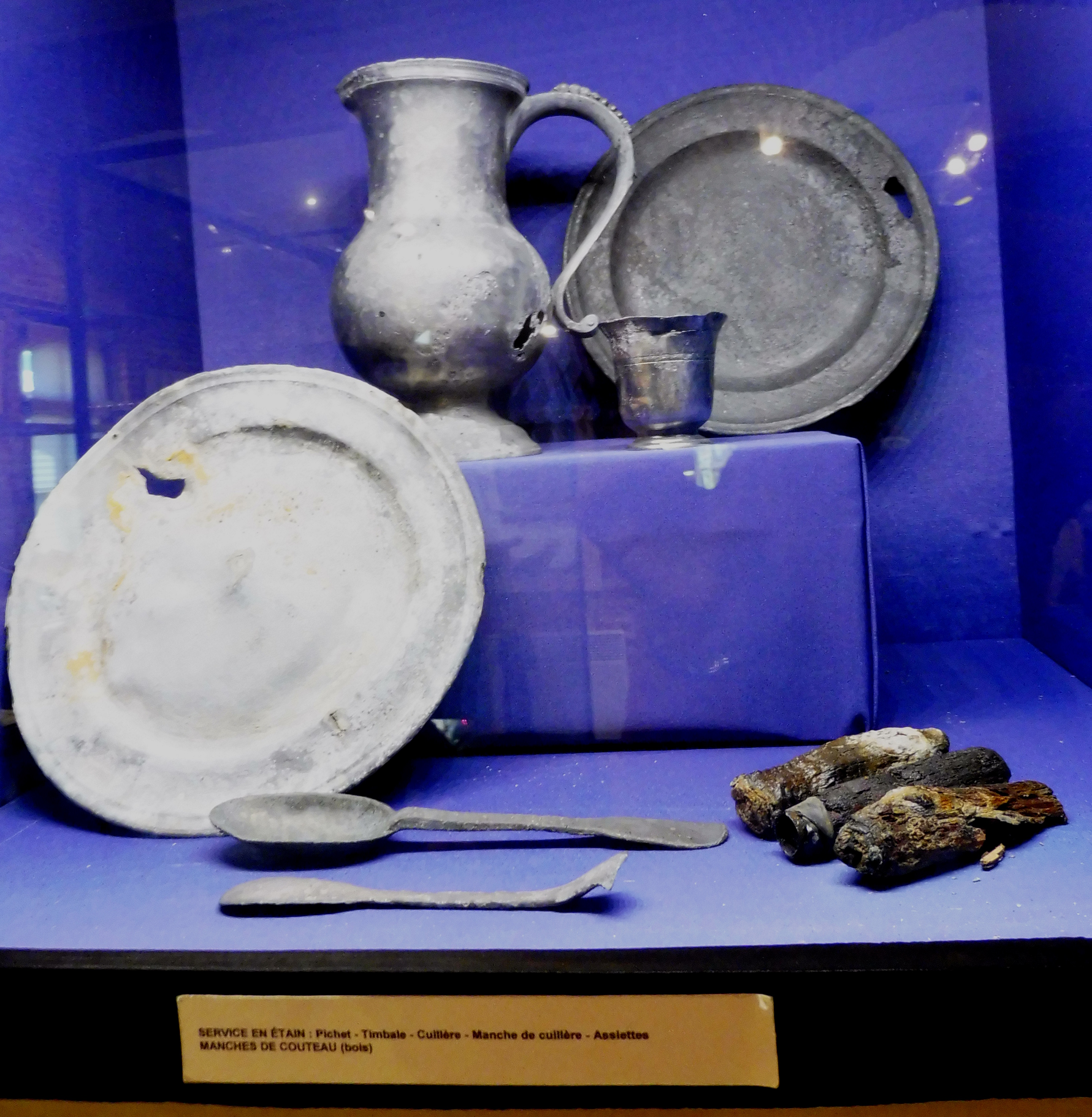 Vaisselle en étain en provenance des recherches archéologiques à Vanikoro, dépôt Musée Lapérouse, Albi. Association Salomon. Collection DRASSM/Ministère de la Culture et de la Communication.